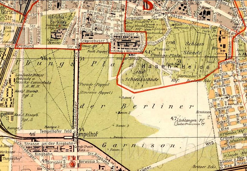 Ausschnitt aus der Beilage zum Adressbuch für Berlin und seine Vororte 1907